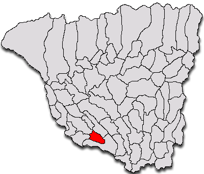 Categorie:Hărţi ale judeţului Gorj